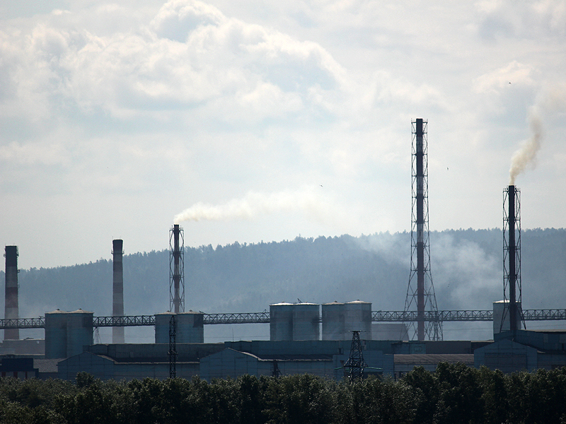 Иркутский алюминиевый завод (ИркАЗ)